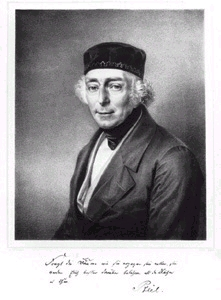 Friedrich Wilhelm Leopold Pfeil (1783-1859), German forestry scientist / Deutscher Forstwissenschaftler